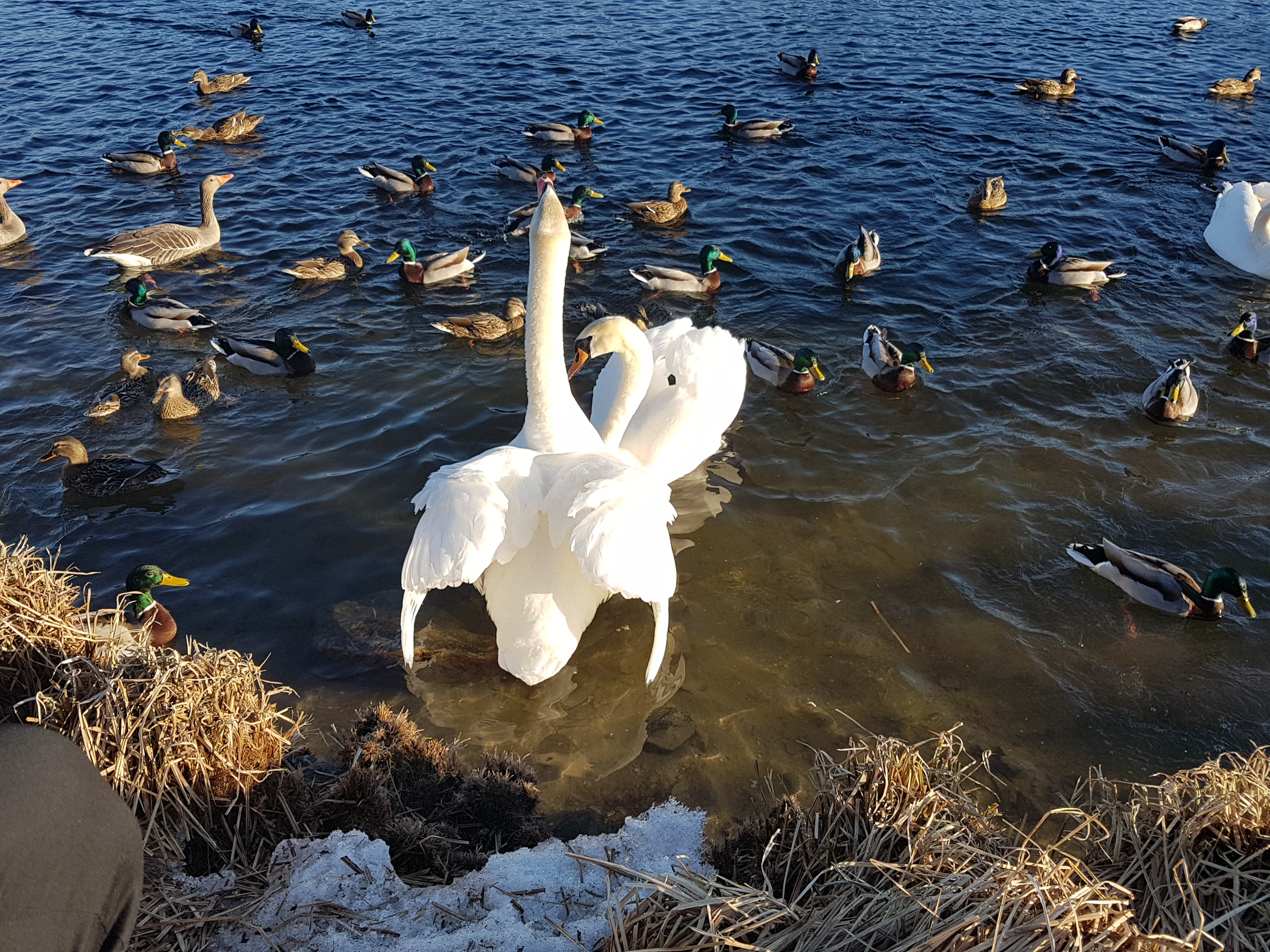 Stokkender (Anas platyrhynchos), grågjess (Anser anser) og knoppsvaner (Cygnus olor) ved Glatved Brygge i Hønefoss, Ringerike kommune, Buskerud (Norway)